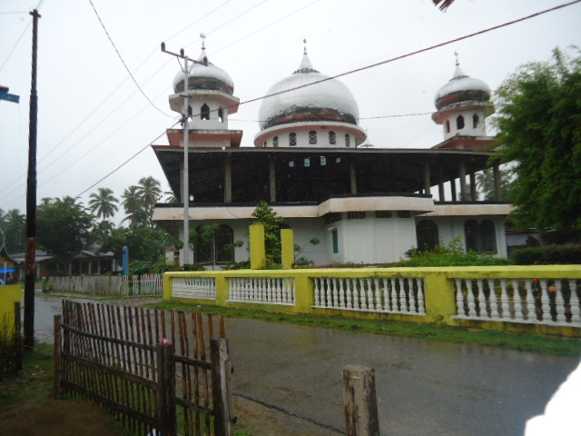 Mesjid Ikhlasul Munawwarah Anakan